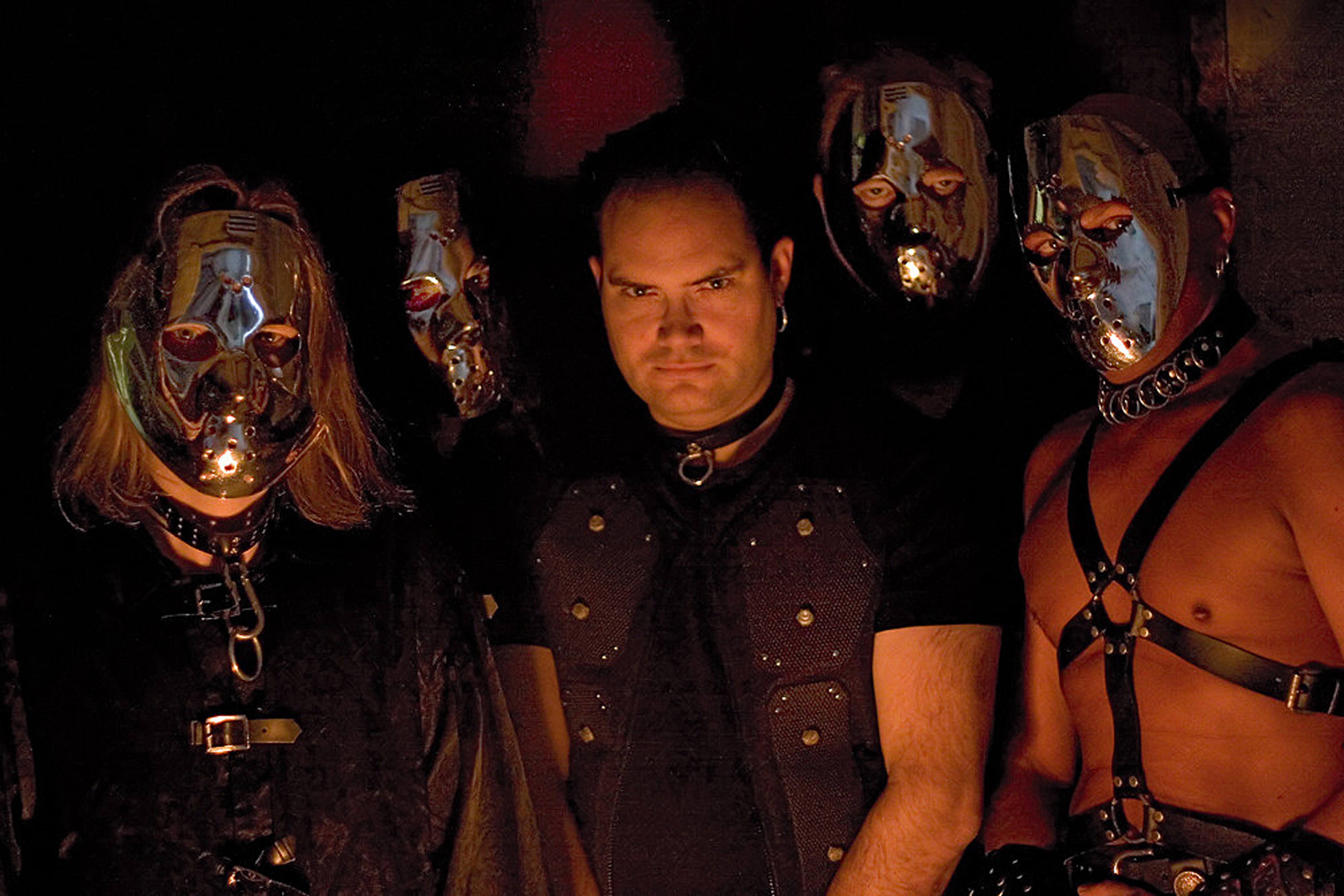 Leichenwetter Promobild.